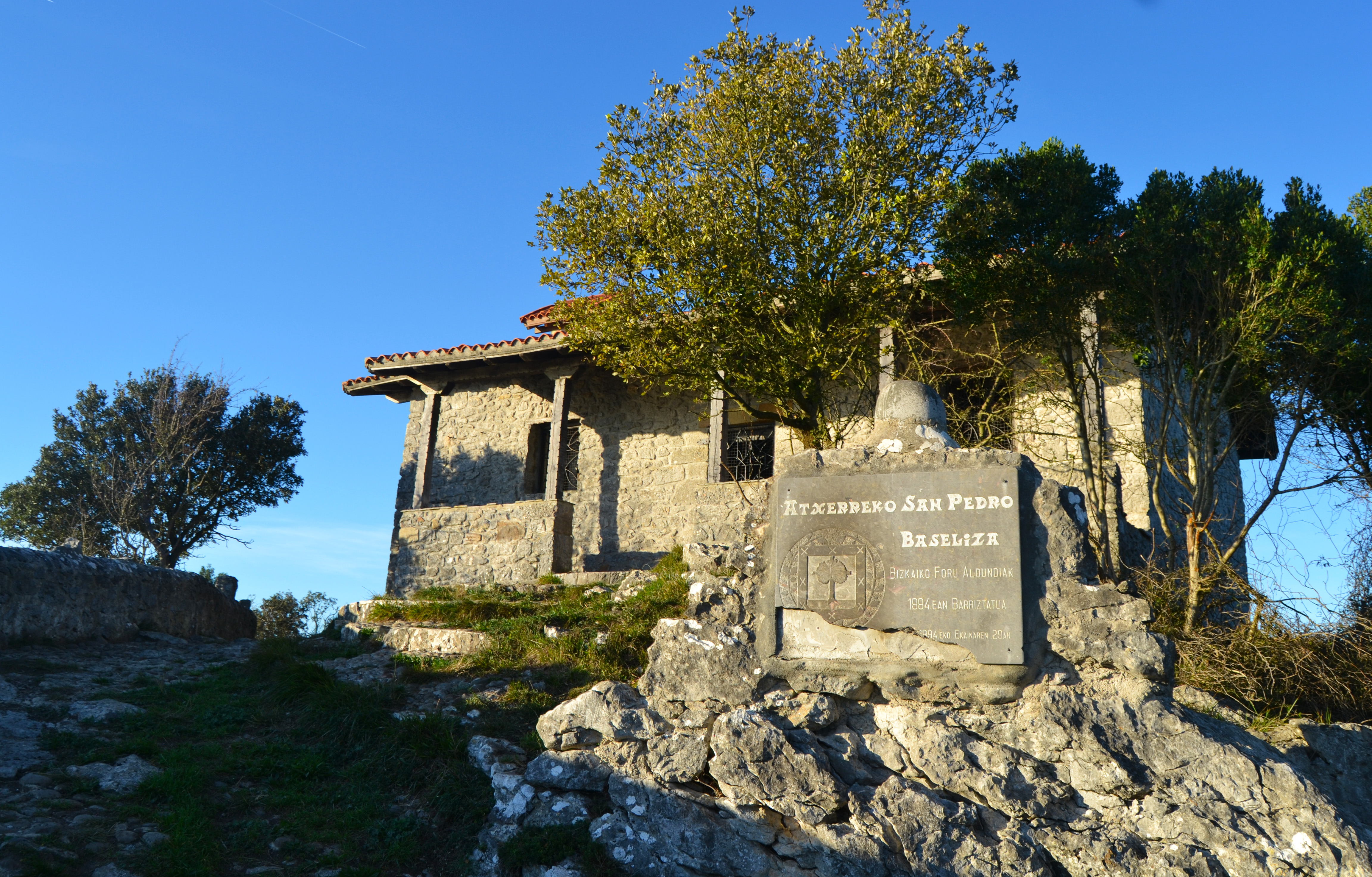 Atxarre mendiko baseliza. Bizkaia, Euskal Herria. Atxarre mountain's hermitage. Bizkaia, Basque Country.